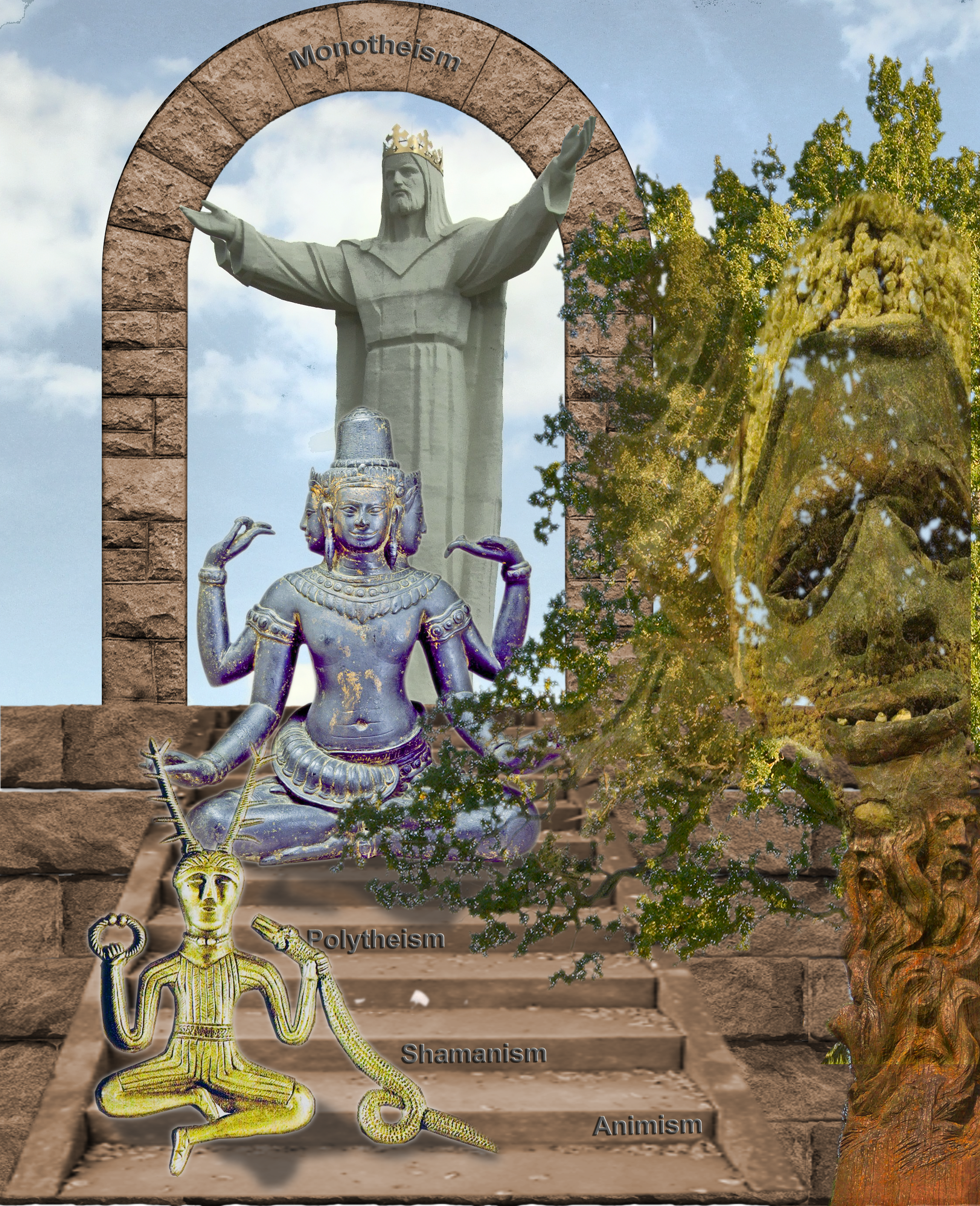 Collage: Cartoonartige Darstellung der evolutionistischen Stufentheorie der Religionen, die – trotz gewichtiger Gegenargumente – immer noch etliche Anhänger hat